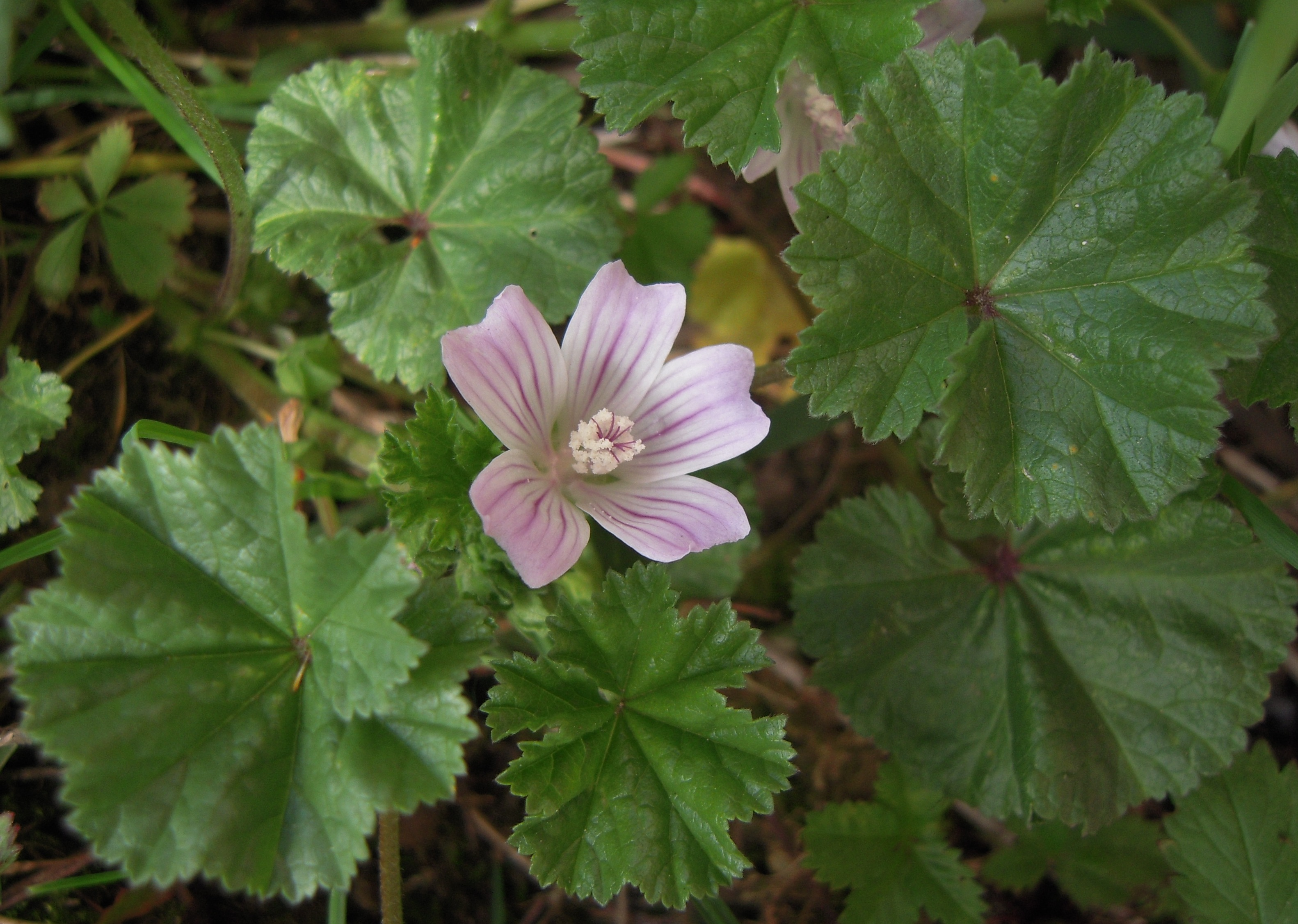 Malva neglecta